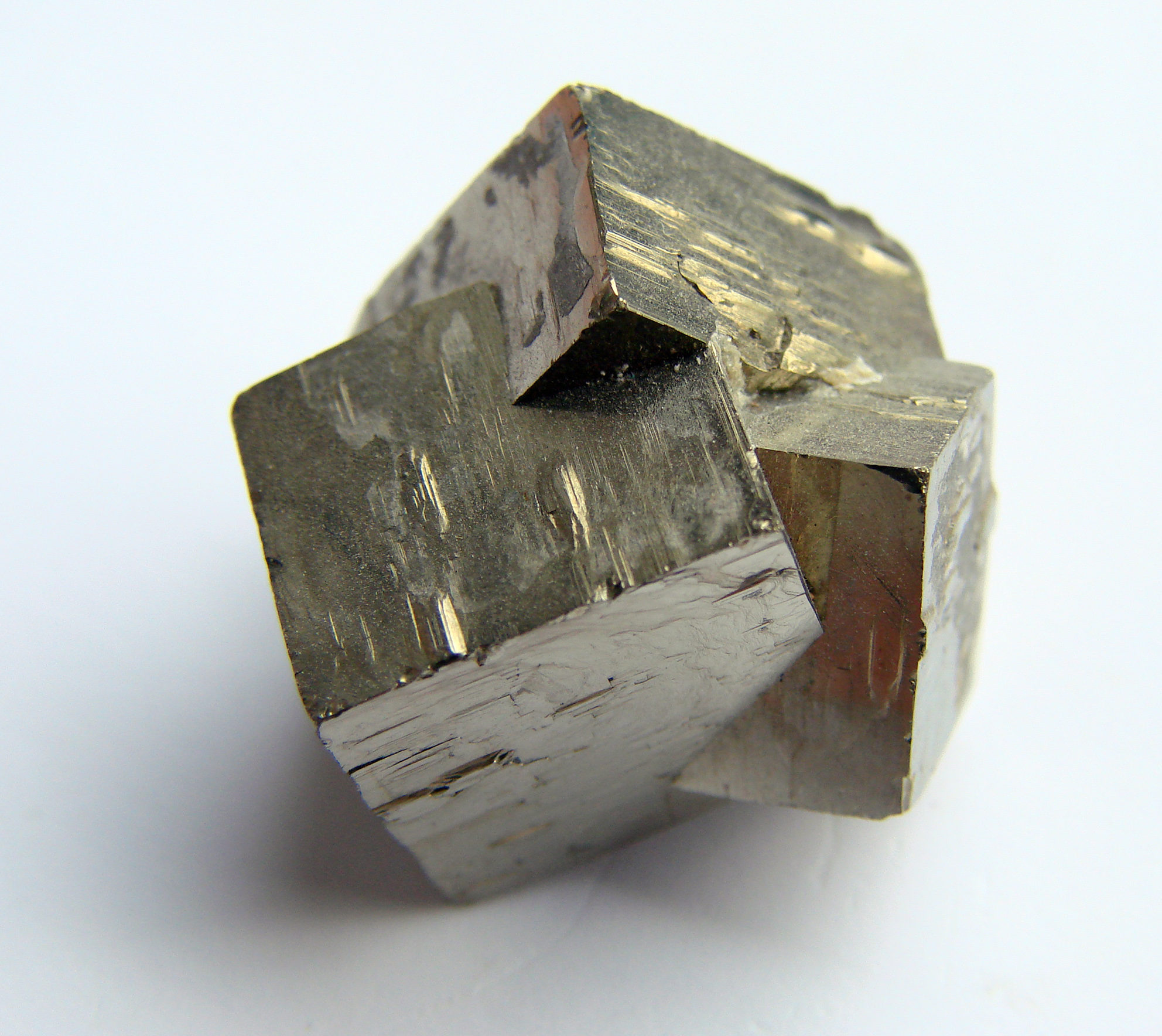 Groupement irrégulier de trois cristaux de pyrite.